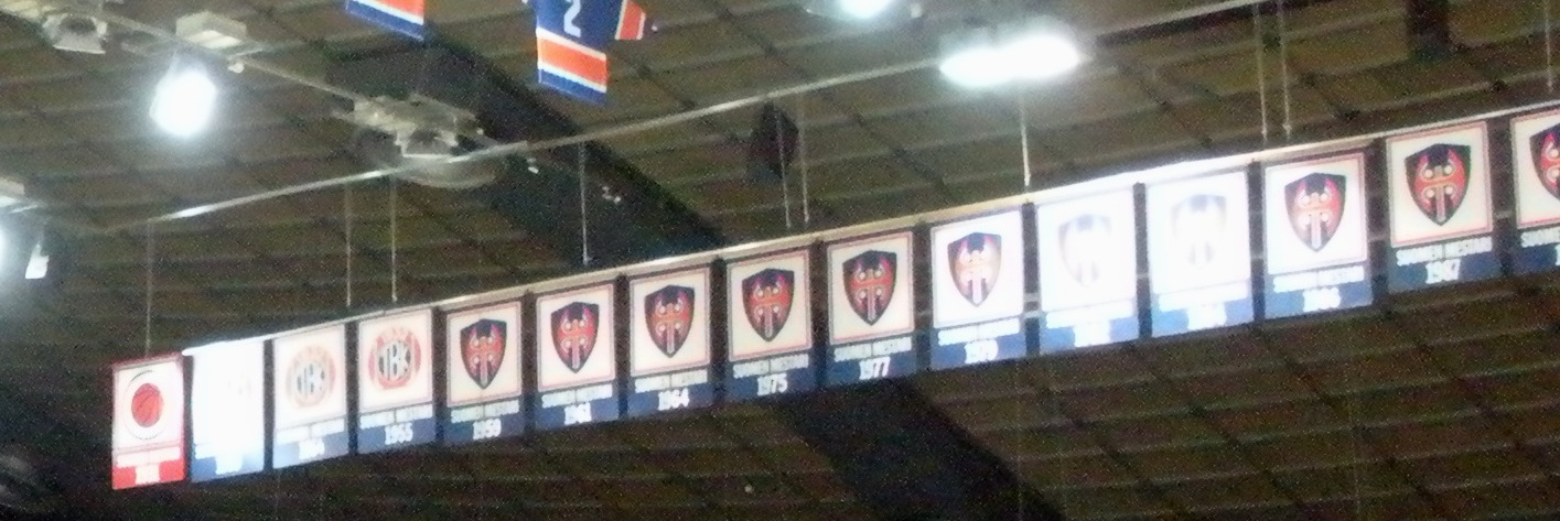 Tapparan mestaruusviirit